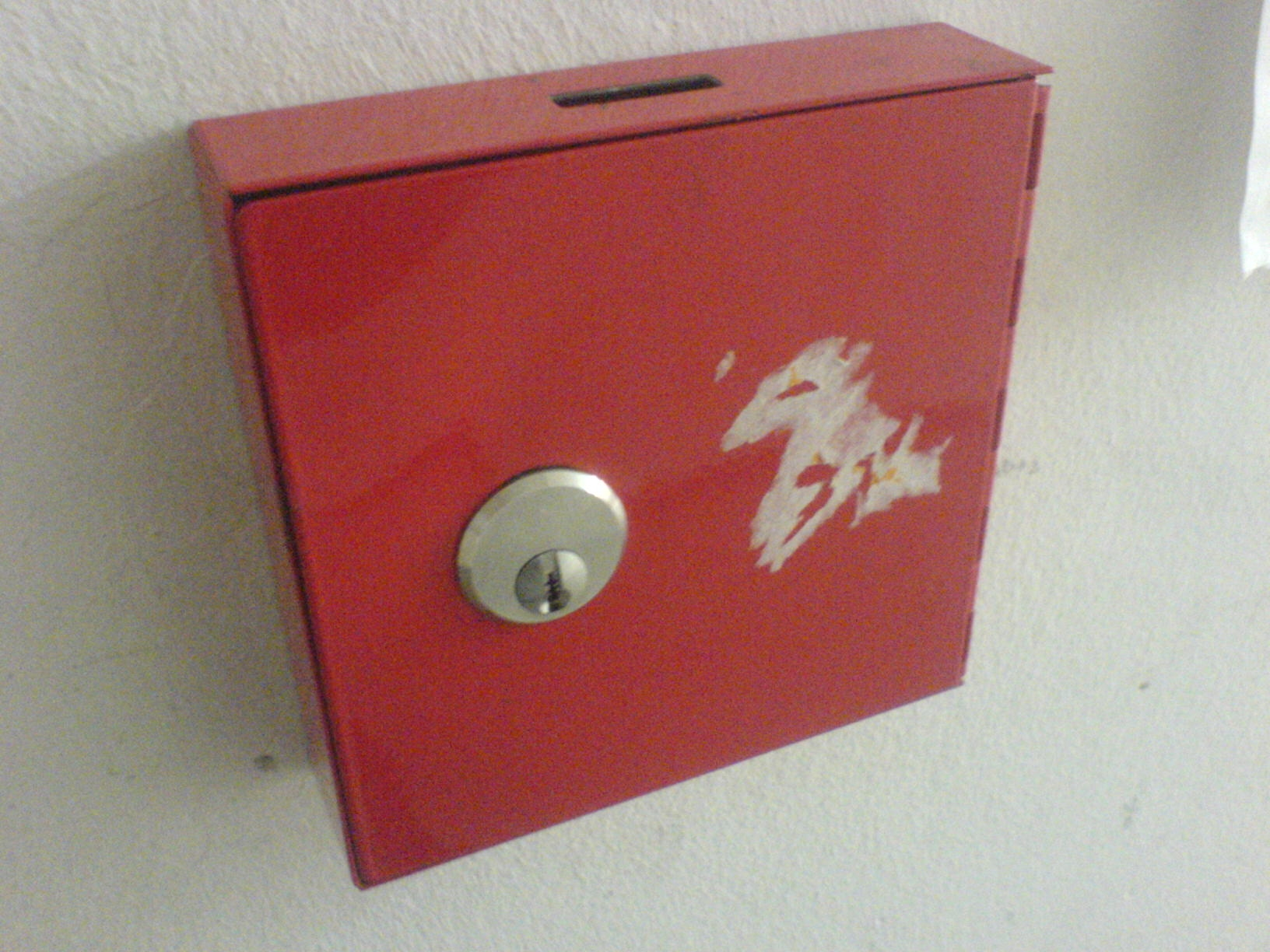 Schlüsselkasten